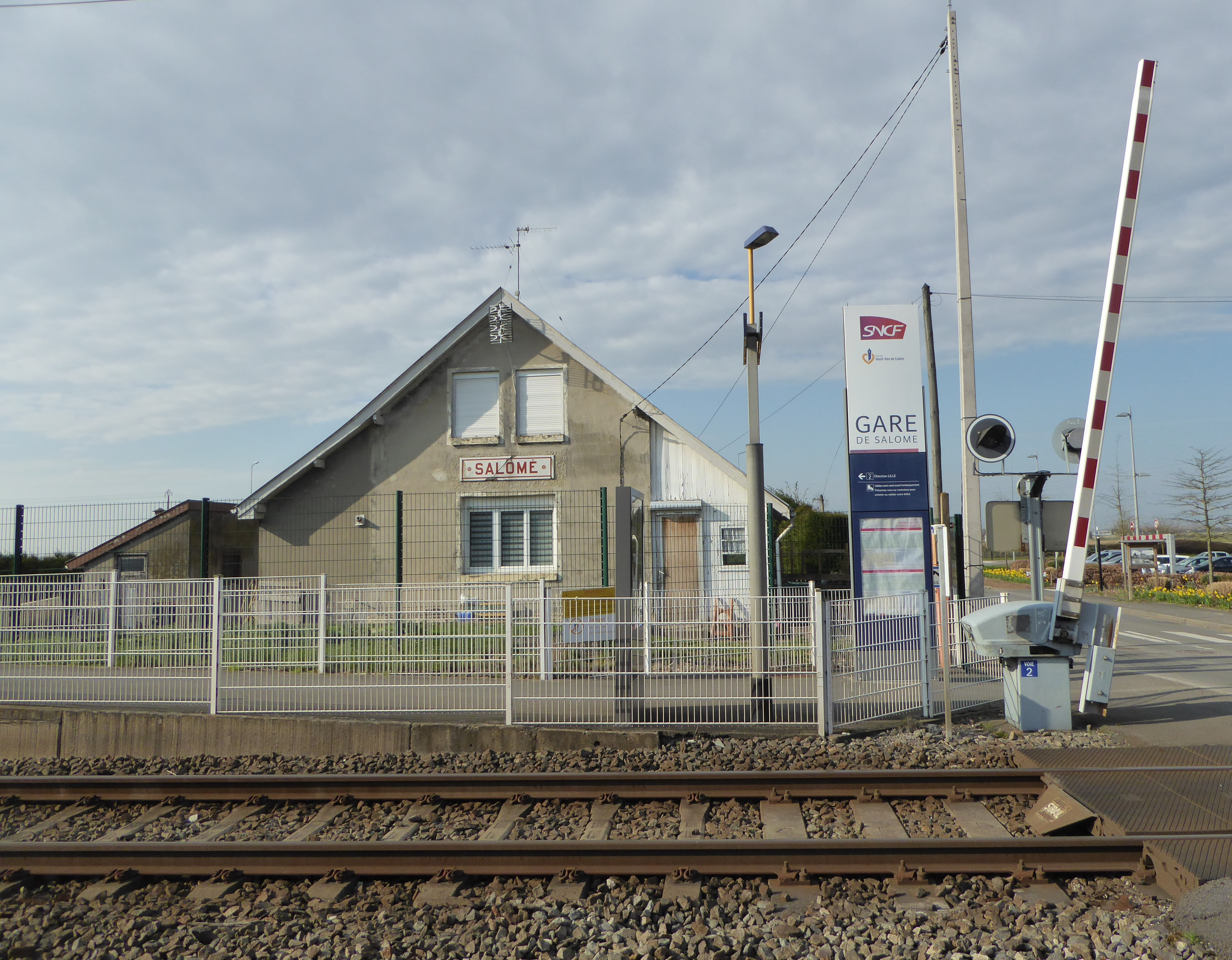 la gare de Salomé_(Nord), France